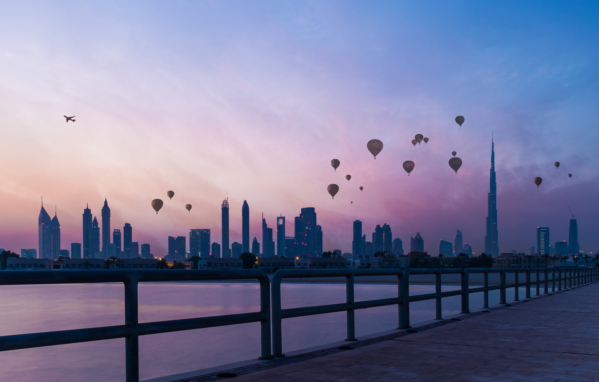 Dubai Skyline